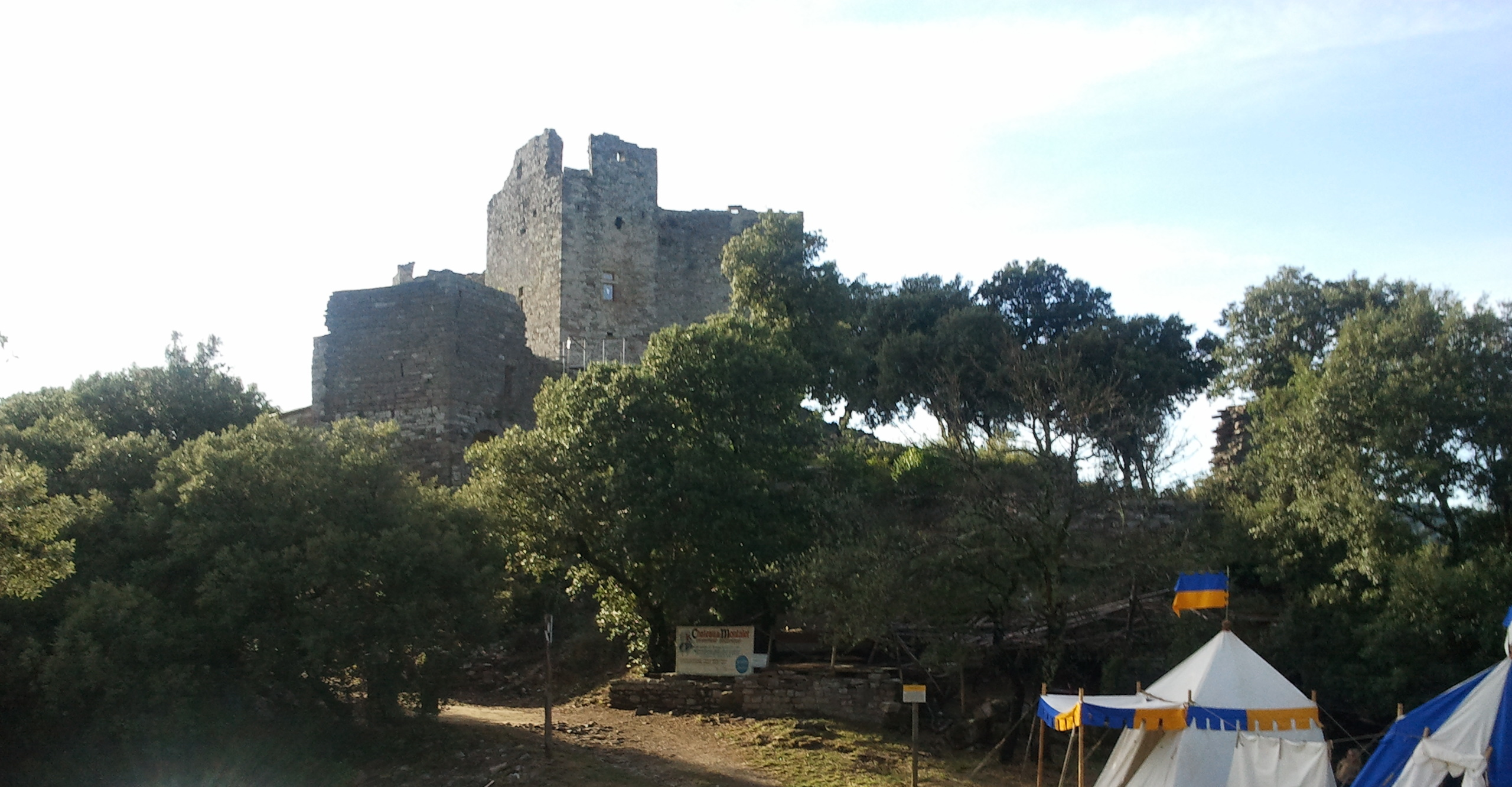 Vue du château depuis la sortie d'un sentier venant de Saint Ambroix